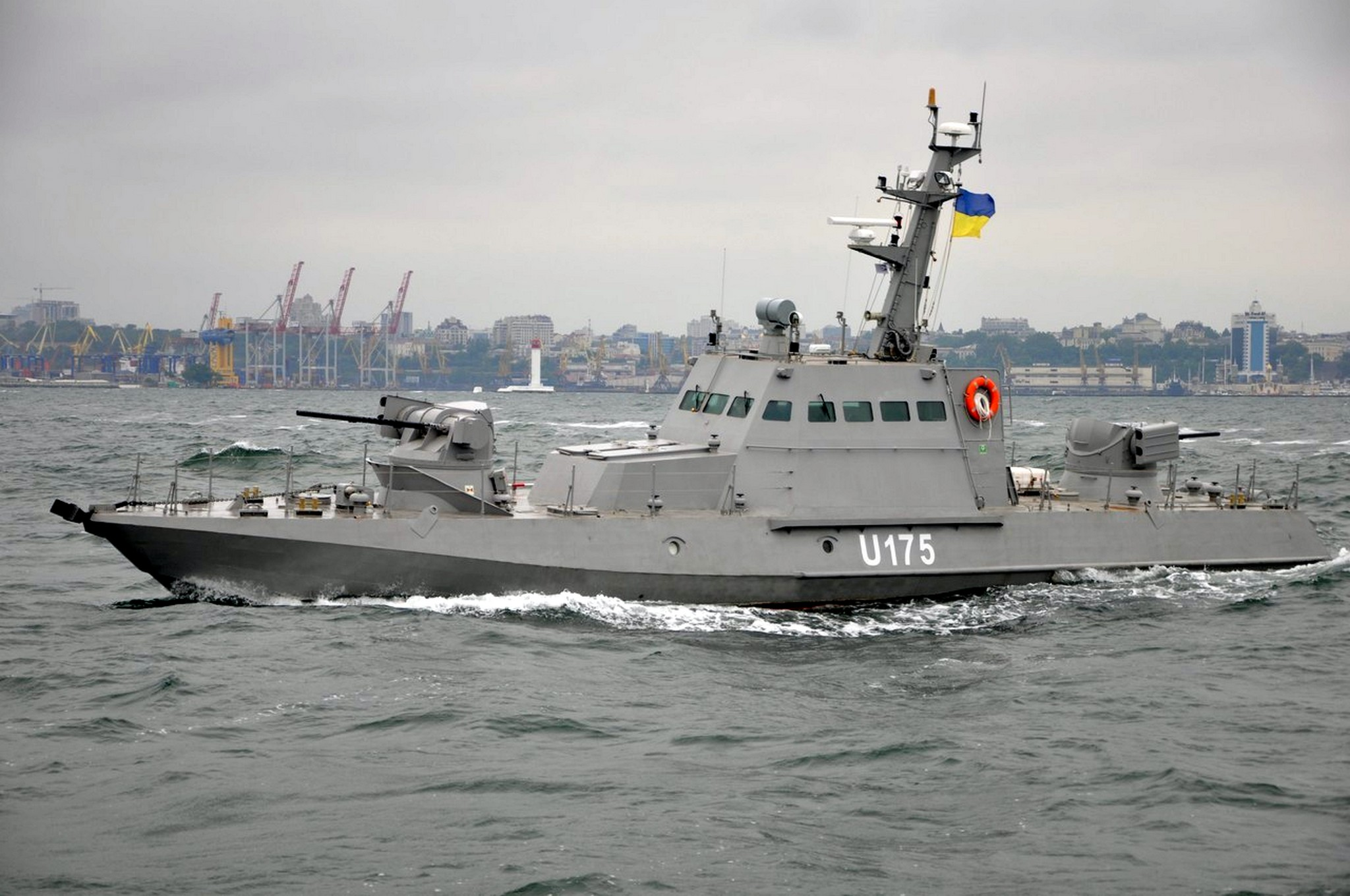 Два новозбудовані для Військово-Морських Сил Збройних Сил України малі броньовані артилерійські катери 2 червня, в ході випробувань в районі Одеської затоки, вперше здійснили спільне плавання. Під час виходу в море у складі тактичної групи катерів перевірено роботу систем і механізмів у штормових умовах. Матеріальна частина працювала в штатному режимі. Як планується ближчим часом малі броньовані артилерійські катери увійдуть до складу ВМС ЗС України. Two newly built small artillery boats of the Ukrainian Navy undergo trials. Their systems and sub-assemblies were checked in storm conditions. The boats were found to be in good state. Small artillery boats are expected to be put into service in the Ukrainian Navy. Прес-центр Командування ВМС ЗС України